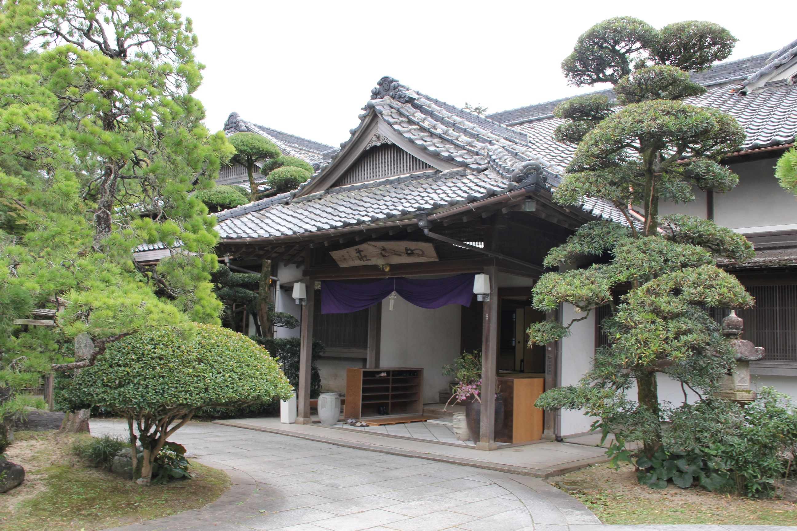 的山荘